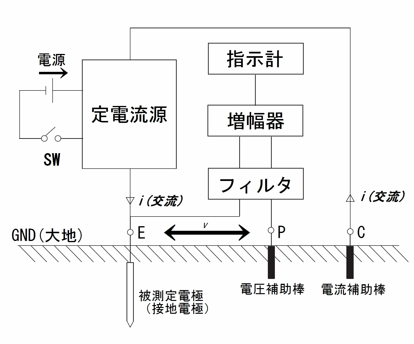 接地抵抗計の説明図